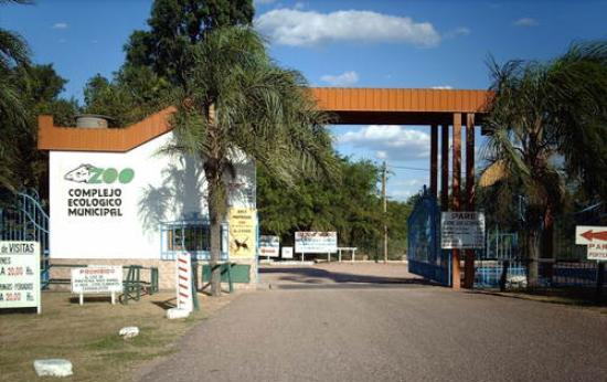 Entrada al complejo ecológico municipal, de Presidencia Roque Sáenz Peña, Chaco, Argentina.